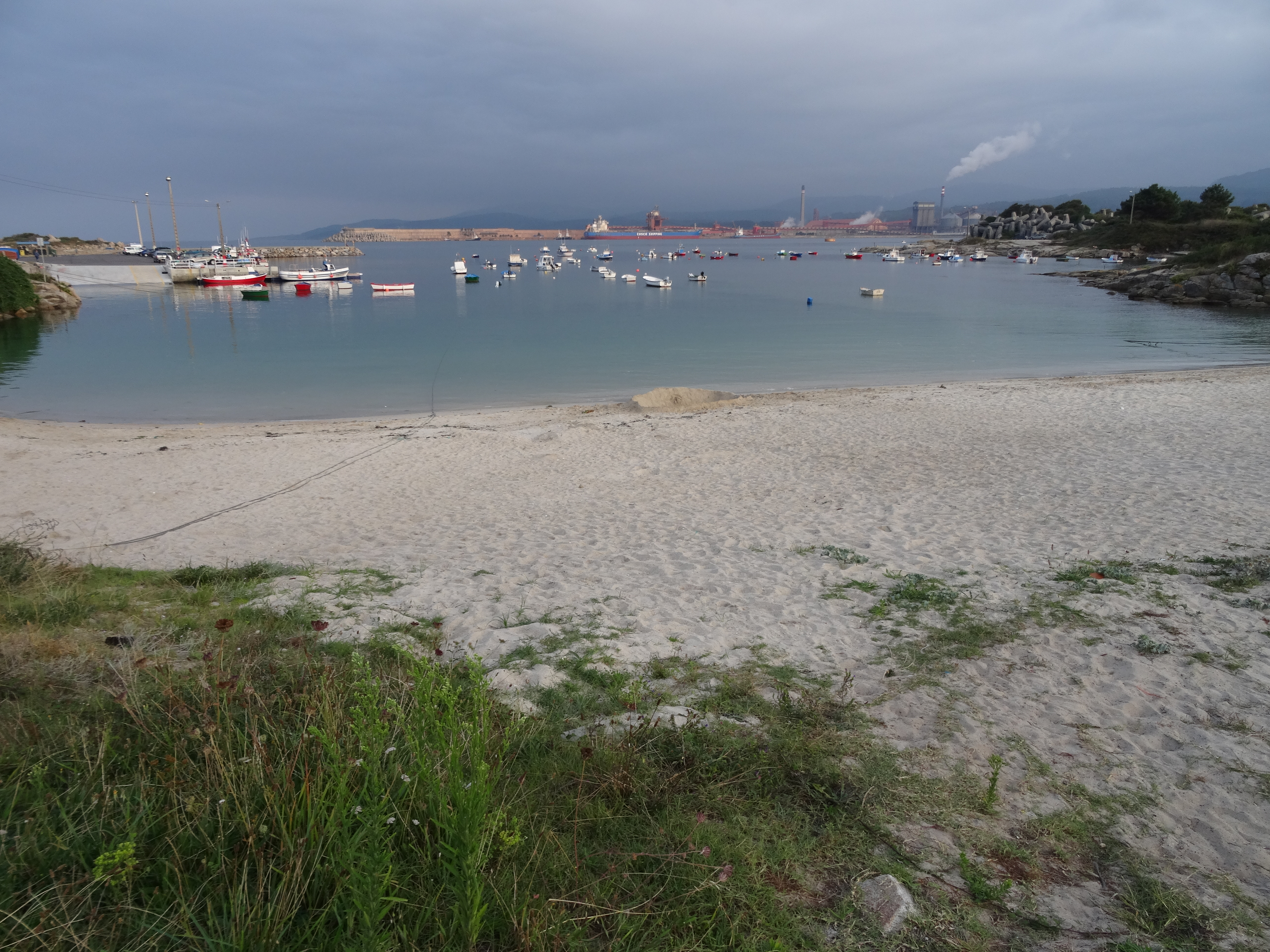 Ver título.